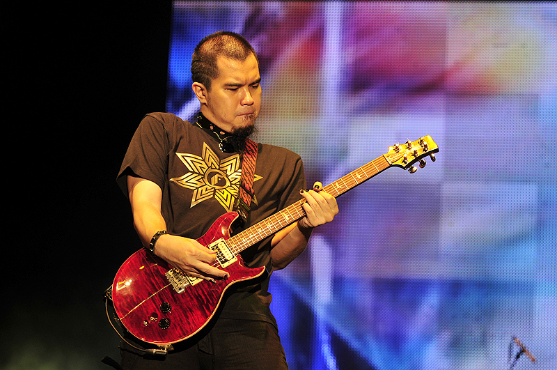 Konsert Pesta Malam Indonesia 3